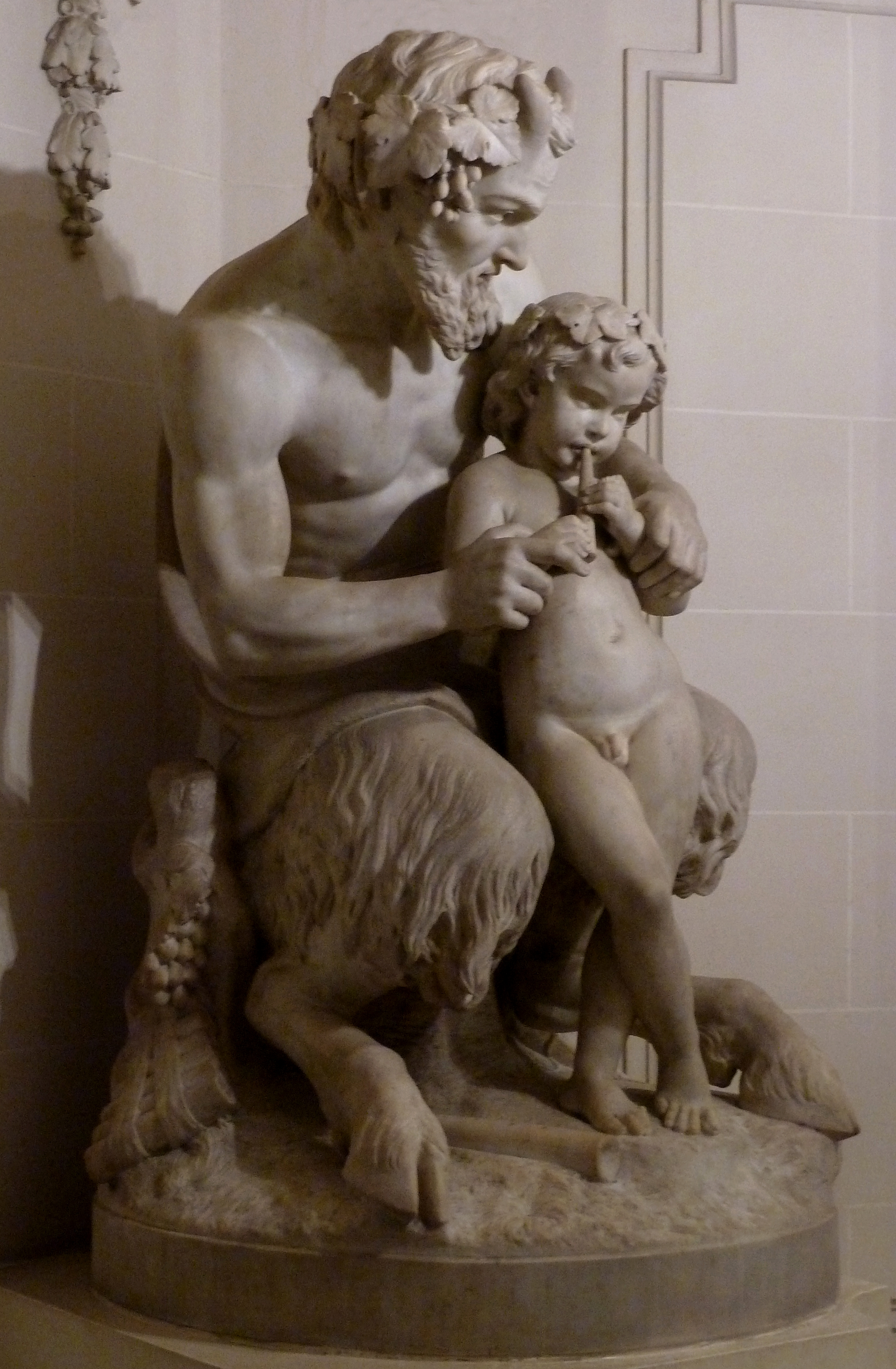 Groupe en marbre Leçon de flûte avec Pan, 1876, portant une signature « Théodore-Martin Hébert ». Hauteur environ 1,50 m. Location : hall de l'immeuble au n°2 de la rue Turgo, Paris (9e arrondissement), collection particulière non référencée.